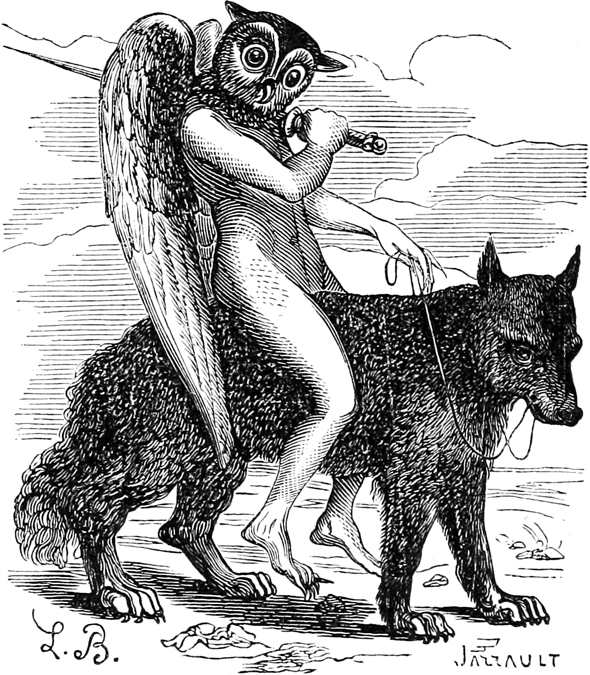 Une illustration pour l’article Andras dans le Dictionnaire infernal par Collin de Plancy.